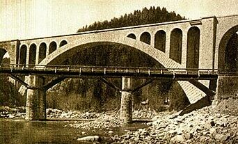 Міст